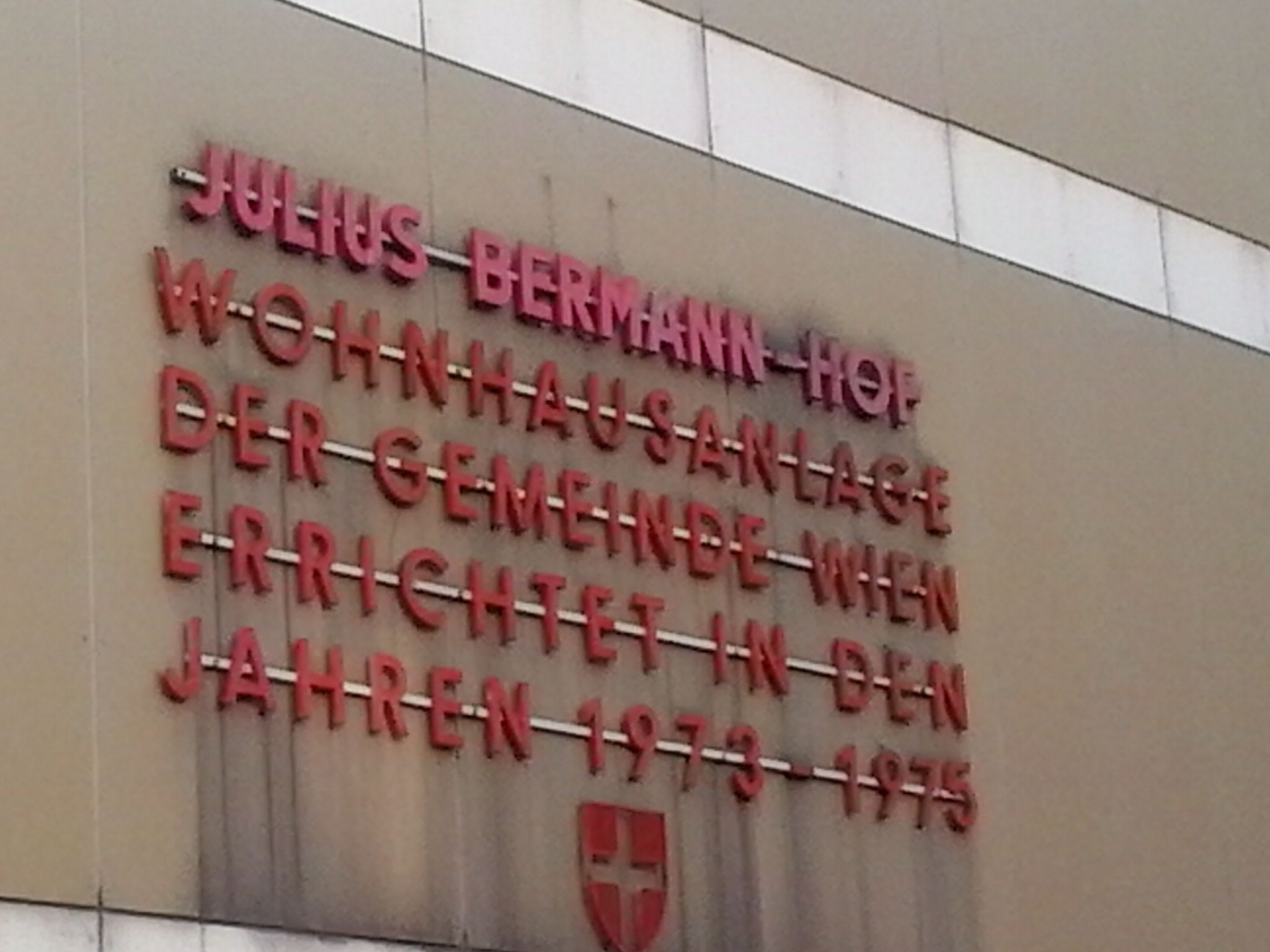 Julius-Bermann-Hof, Wien, Hinweis an der Fassade This media shows the Vienna residential building (Gemeindebau) with the ID 252.